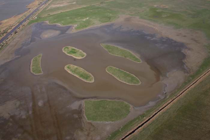 Nyéki szállás (Mekszikópuszta, Győr-Moson-Sopron megye)